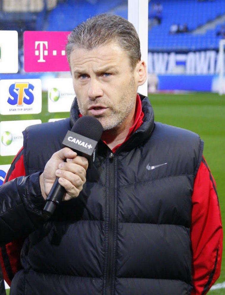 Pavel Hapal, trener Zagłębia Lubin